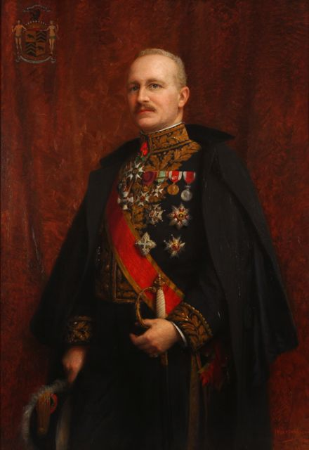 Portrait of Gaston van de Werve de Schilde